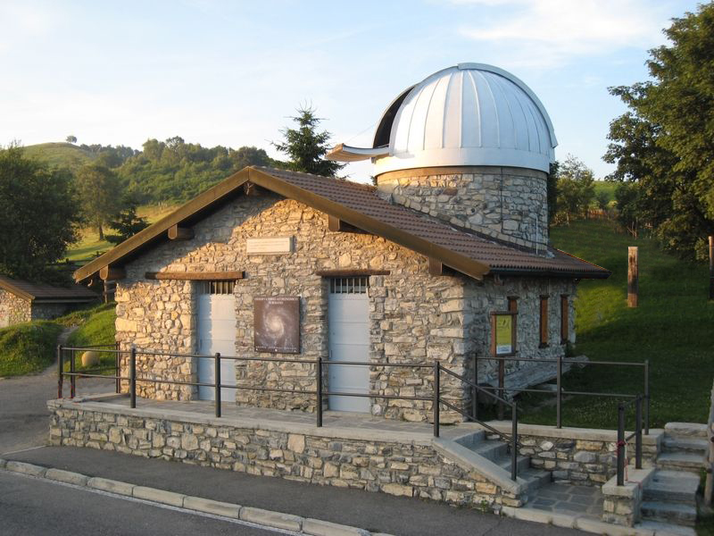 Osservatorio Astronomico Sormano - La Colma del Piano, Como - Italia